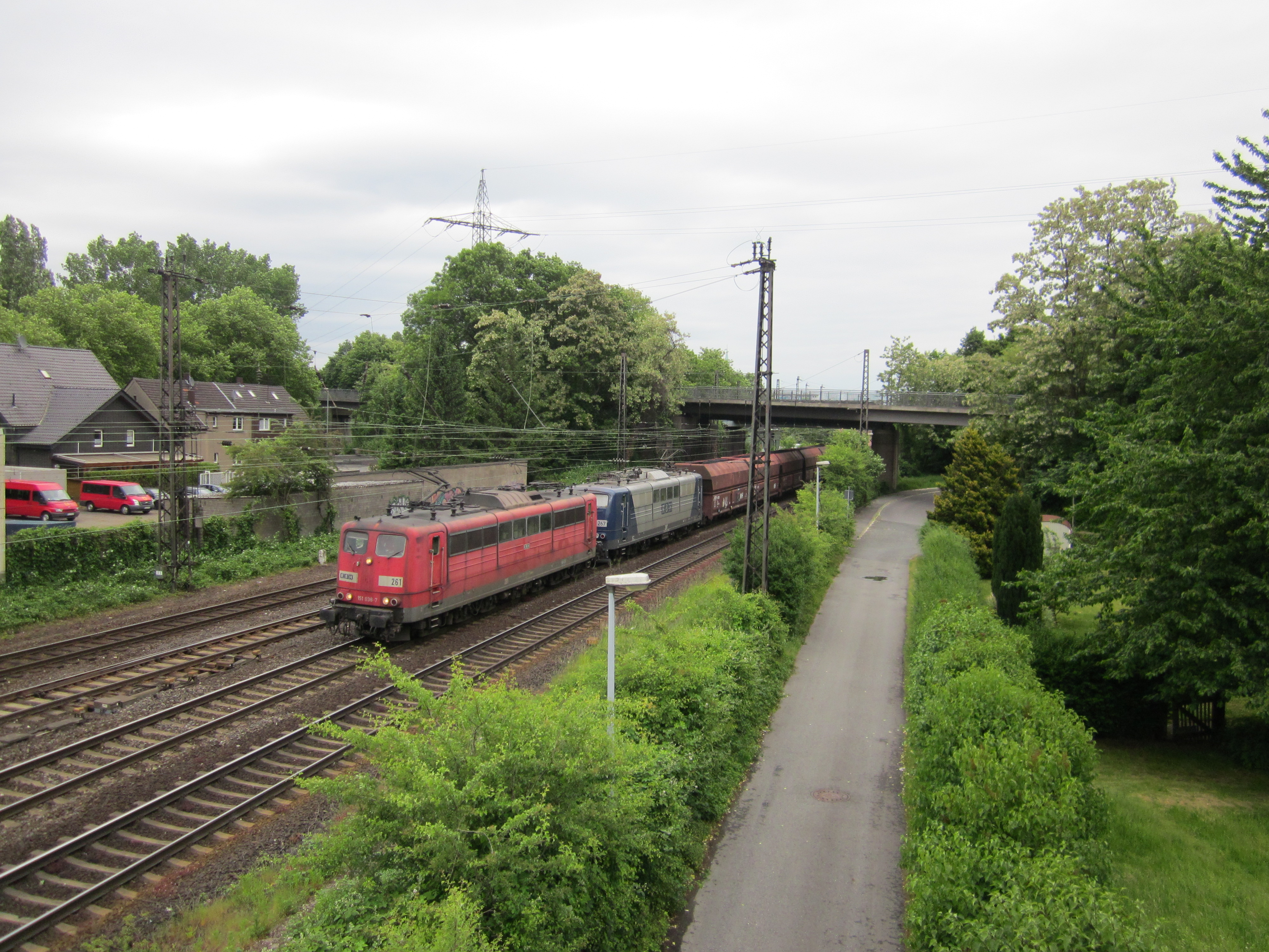 2 locomotieven van de BR 151 in dienst bij RBH. De voorste heeft nog de rode kleur van moederbedrijf DB Cargo. De achterste loc heeft de RBH huisstijlkleur.